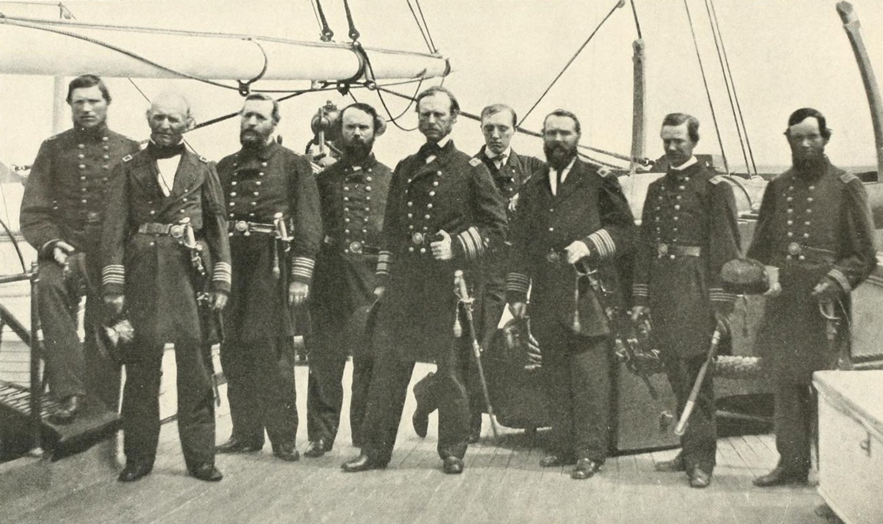 Admiral John A. Dahlgren & staff